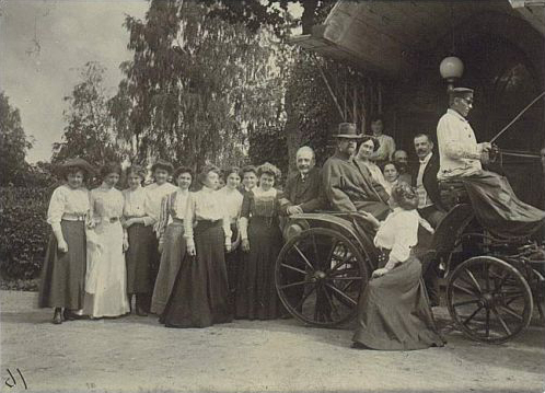 Åarjelsaemien: Флер’янова (Flerjanova), сядзіба Бохвіцаў (Bochvic). Аўрэлія і Уладзіслаў Рэйманты зь сябрамі